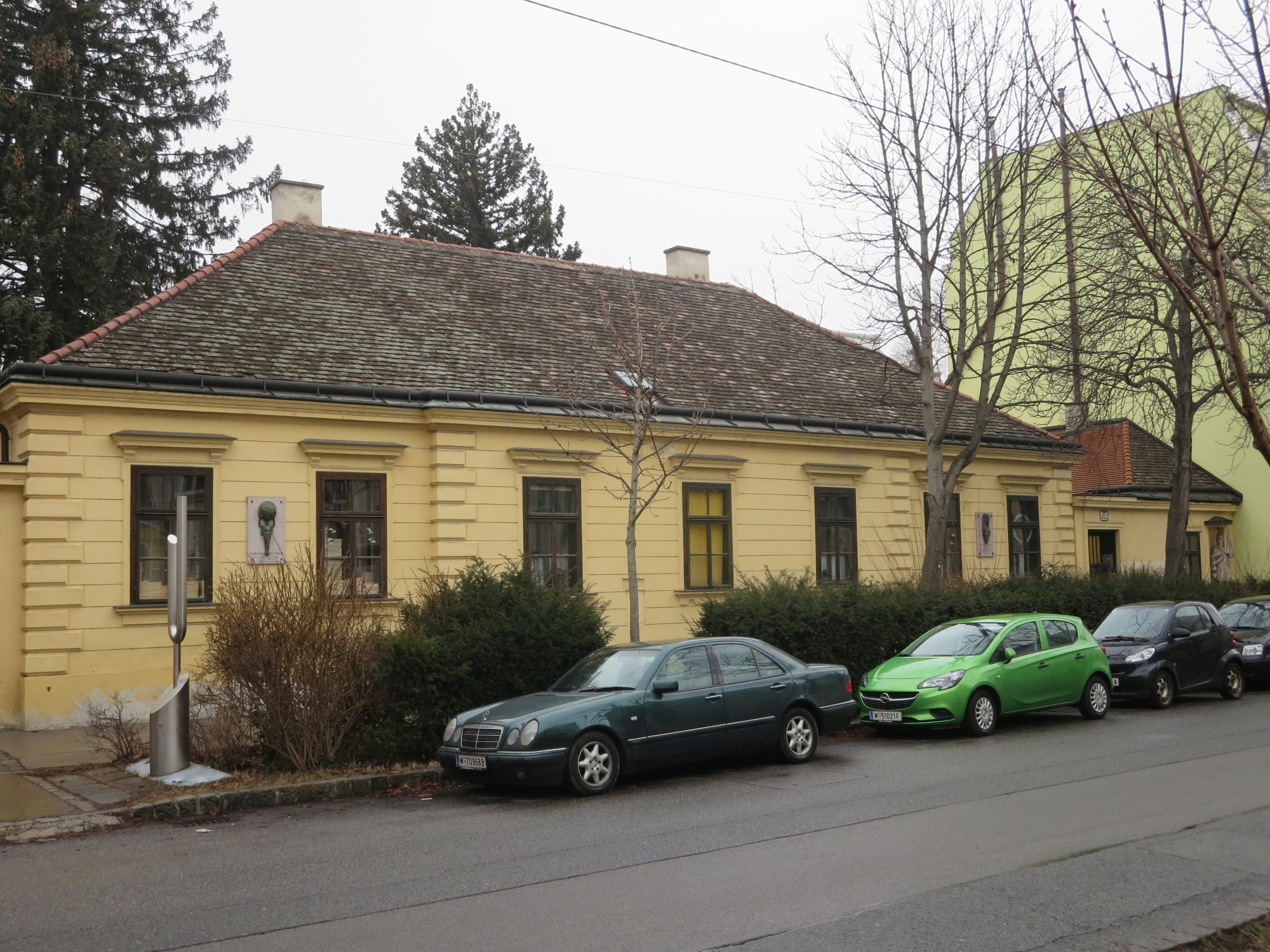 Erdödy-Landgut in der Jeneweingasse 17 in Wien-Floridsdorf. Ganz rechts der hl. Florian.